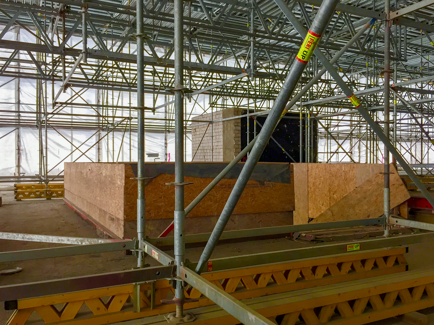 Zur Baustellenbesichtigung der Neuen Nationalgalerie im September 2018 präsentierte sich die Eingangshalle in nahezu Rohbauzustand. Abgebildet ist der südliche Treppenabgang und der gemauerte Kern des Lastenaufzugs.